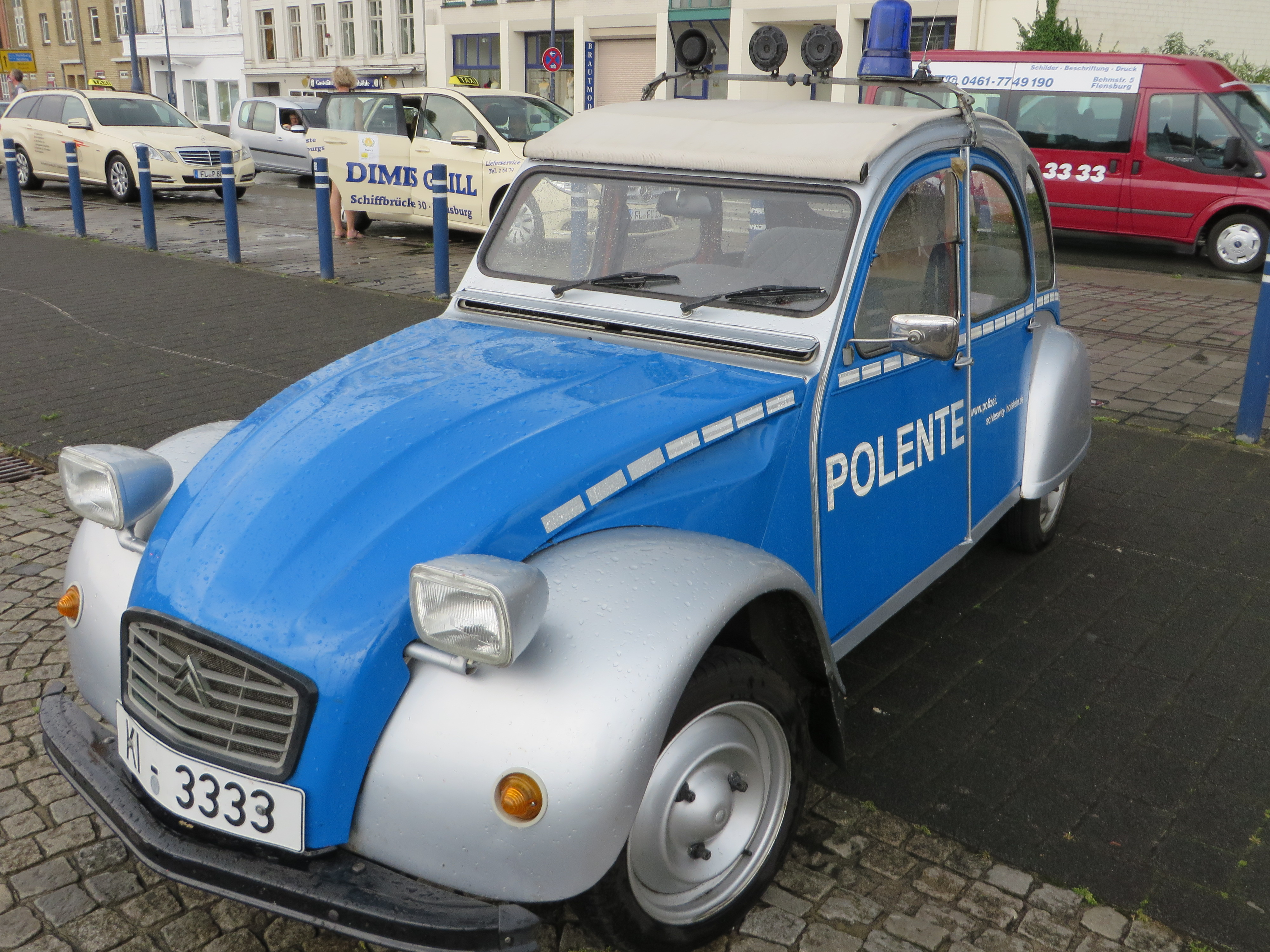 Blaulichttag 2014 in Flensburg, Bild 19, Die Polente eine Polizei-Ente (Citroën 2CV)